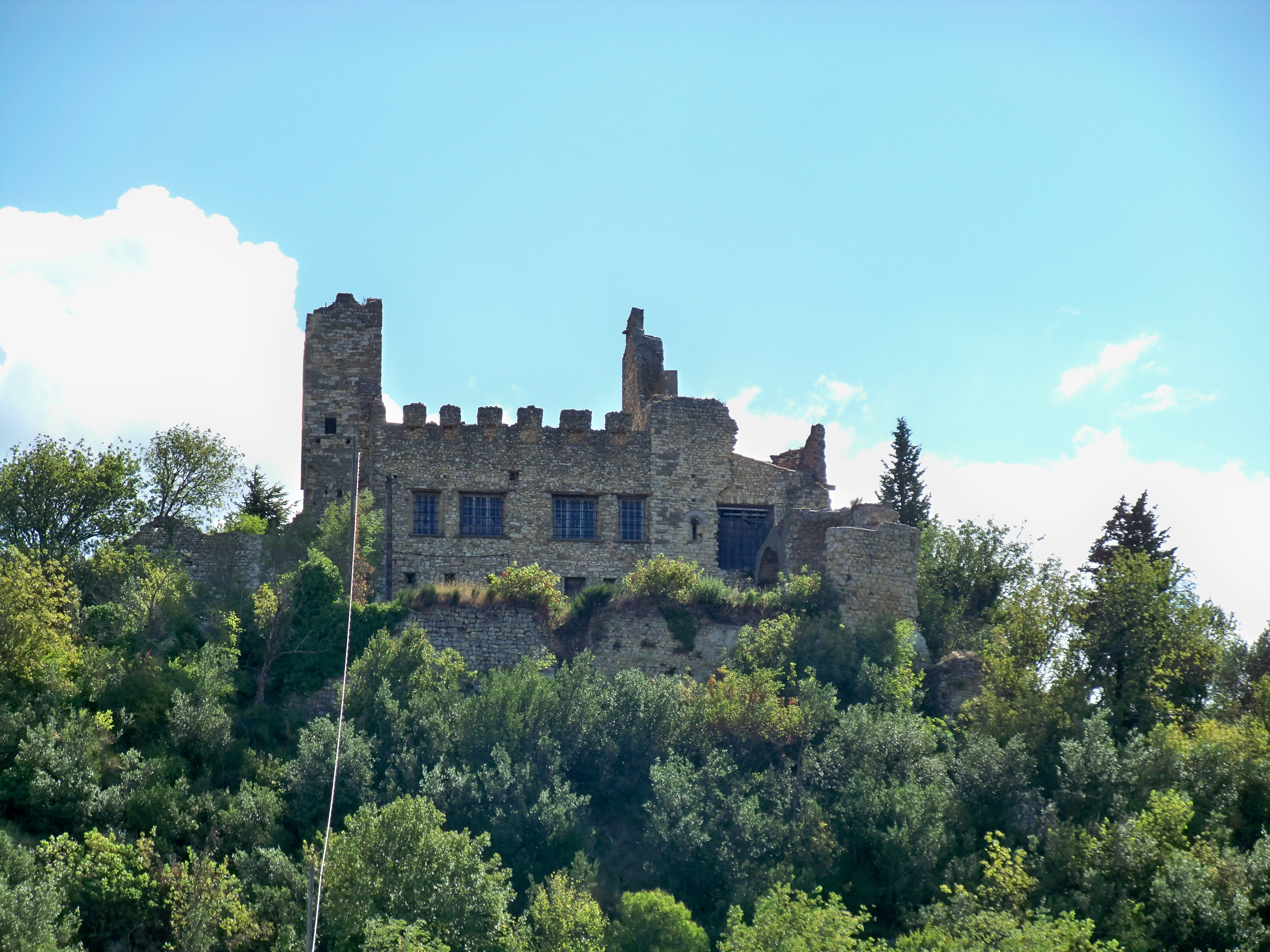 Chateau de Mondragon, Vaucluse, France